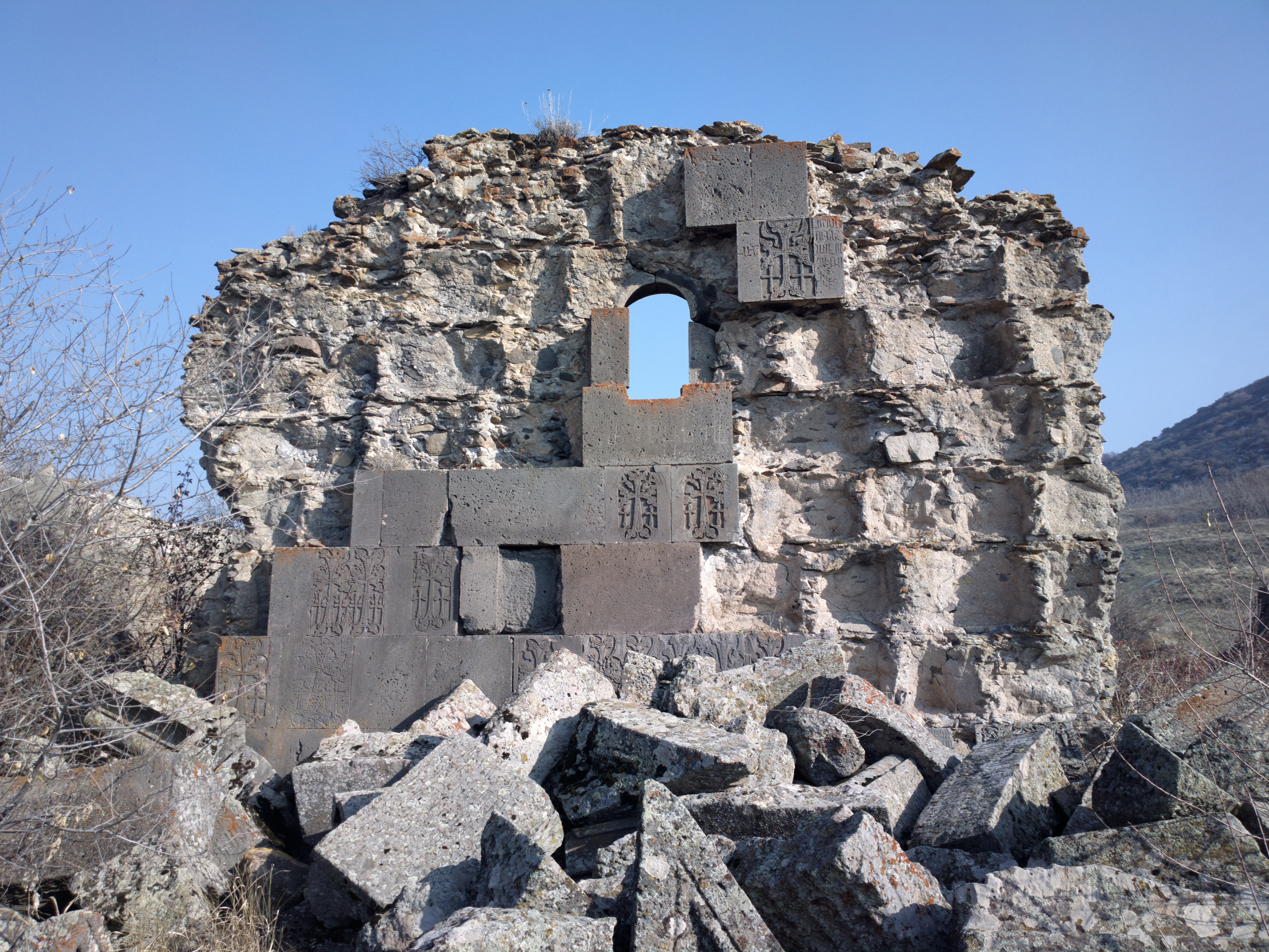 Հավուց Թառի խաչաքանդակներ 99.4/3.6